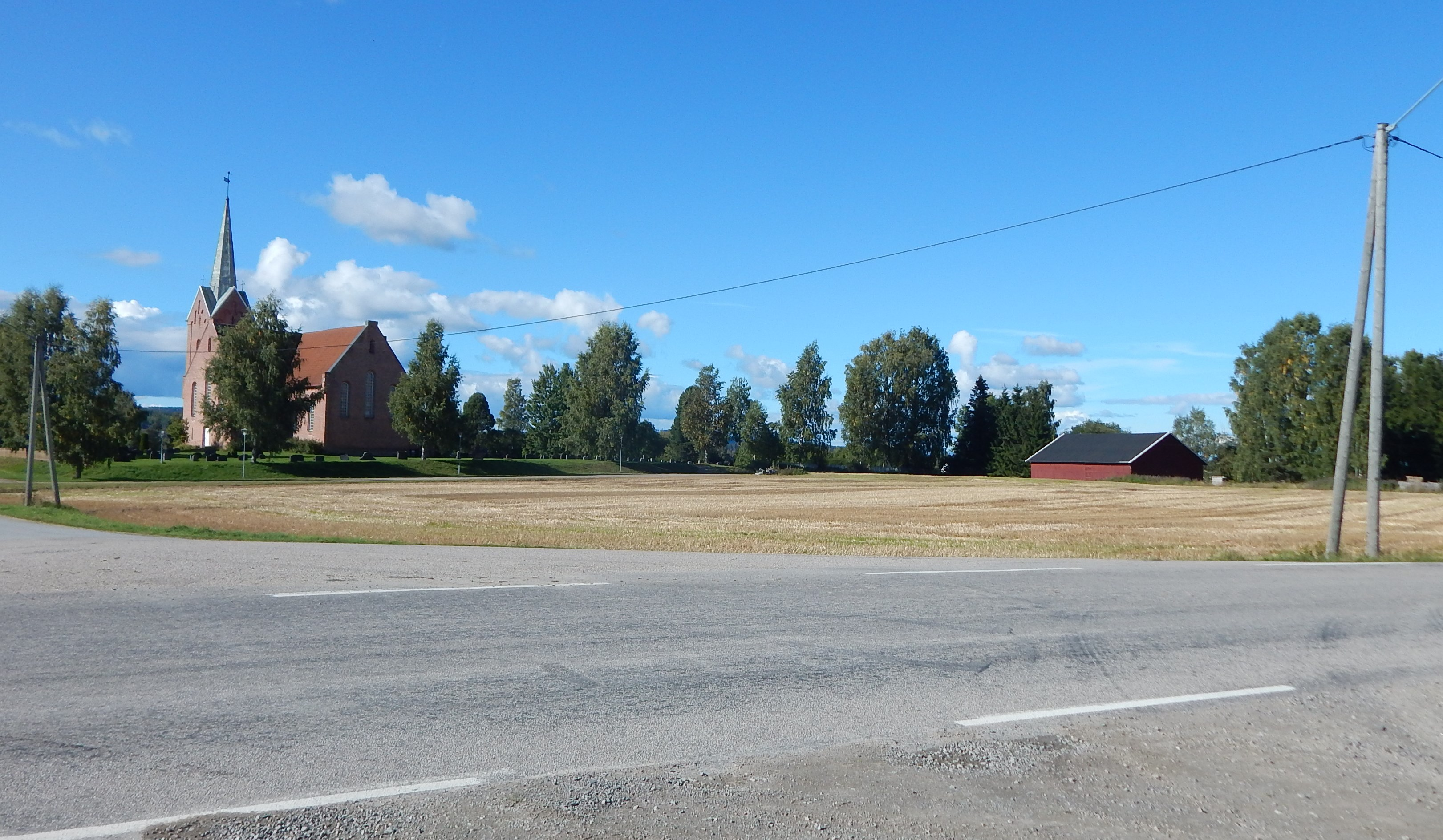 Søren Bergs veg (fylkesvei 431) ved Hof kirke